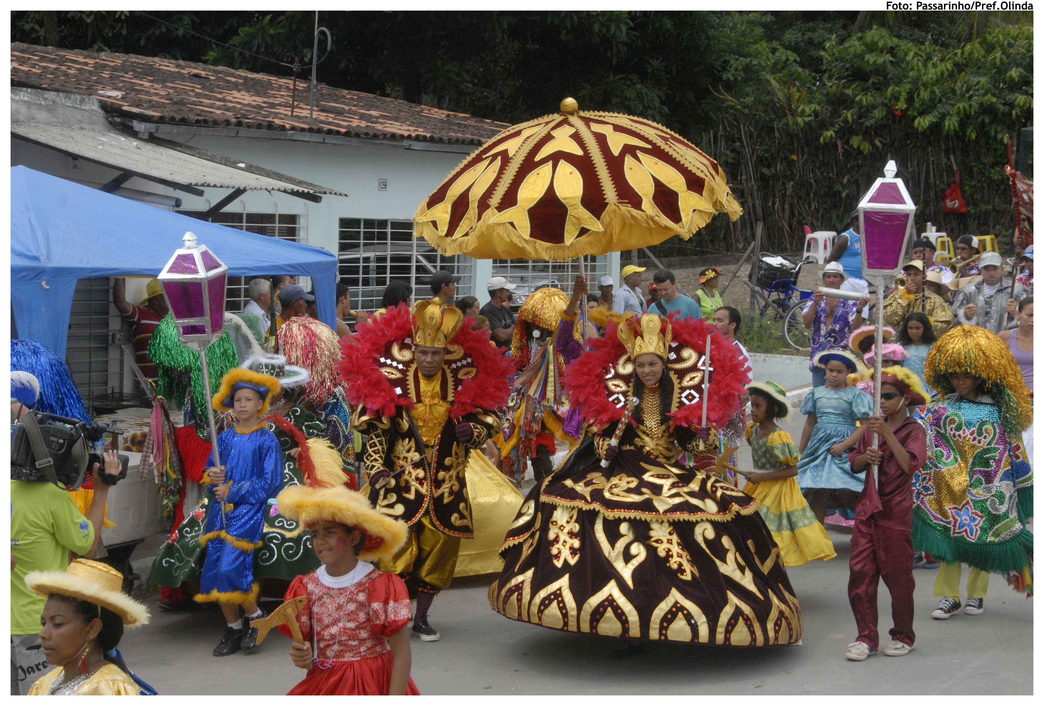 Foto: Passarinho/Pref.Olinda